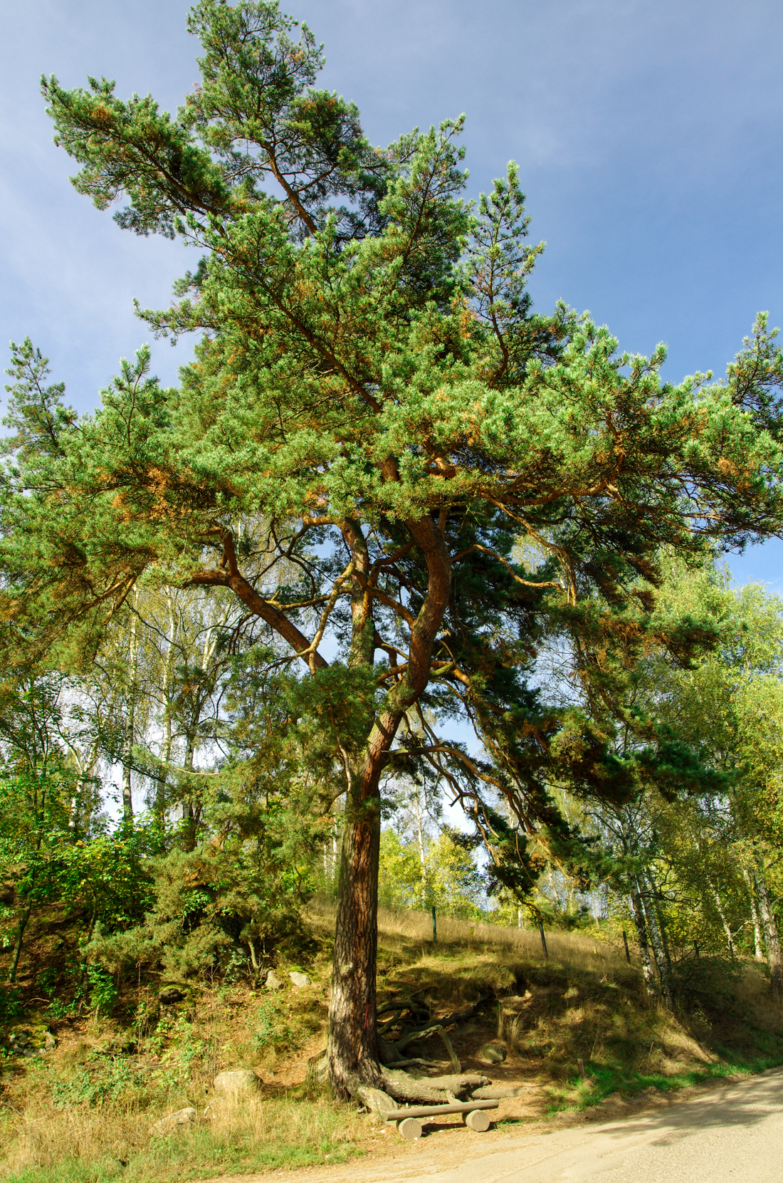 památný strom Pozorecká borovice, Pozorka u Nejdku, okres Karlovy Vary